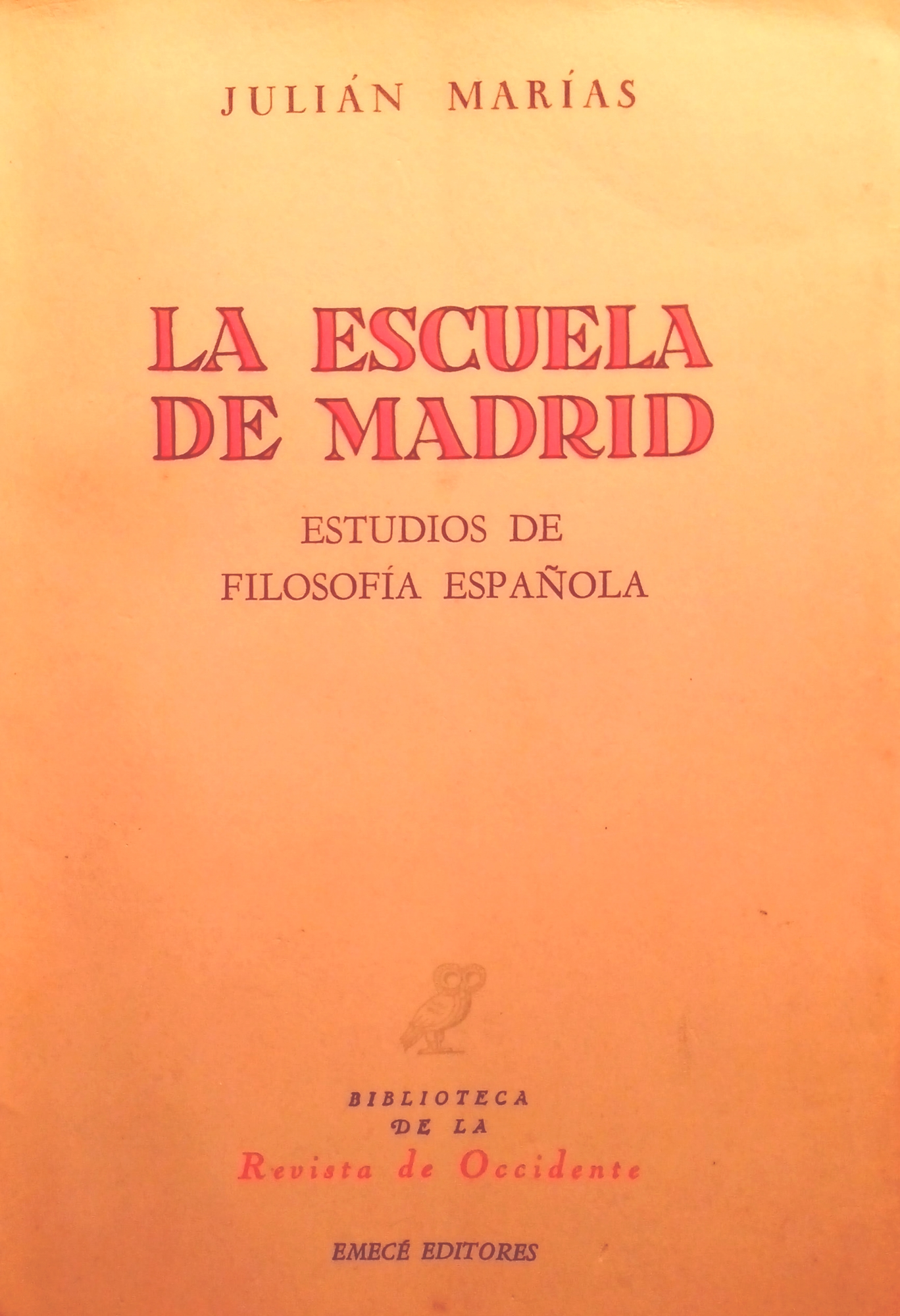 La escuela de Madrid, Julián Marías.